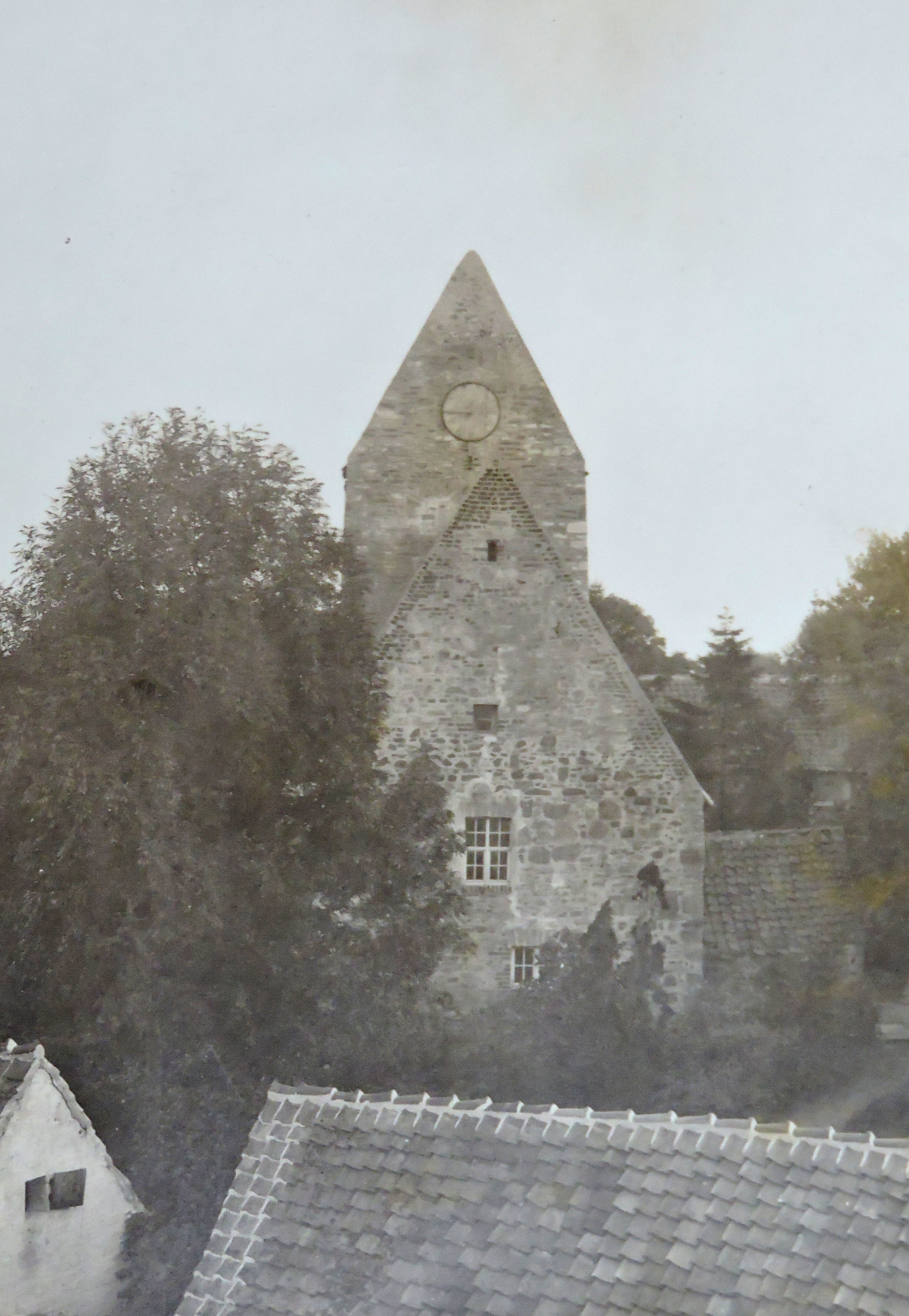 Dorfkirche Groppendorf außen (1906)